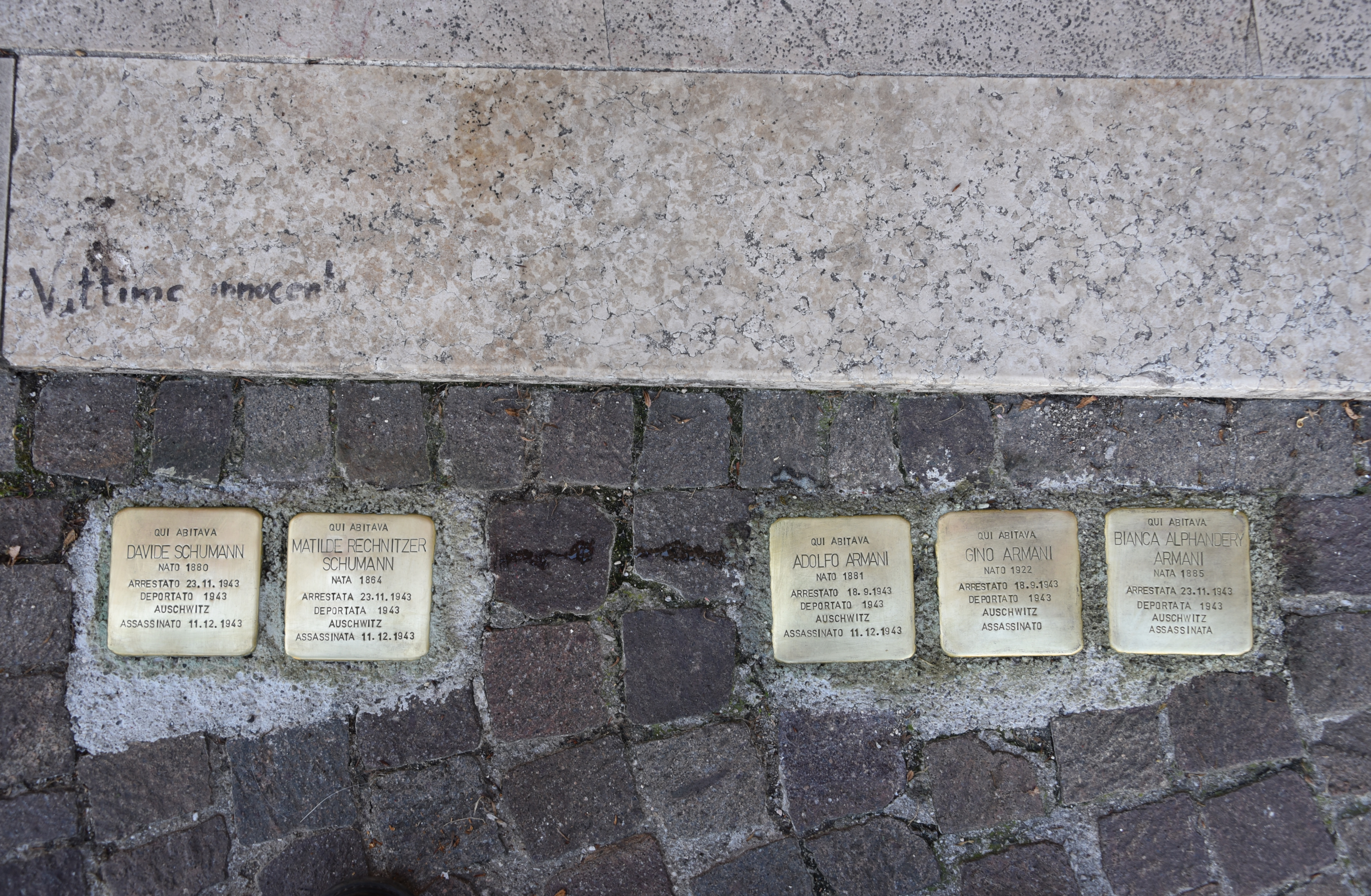 Stolpersteine in Gorizio für Familie Schumann und Familie Armani